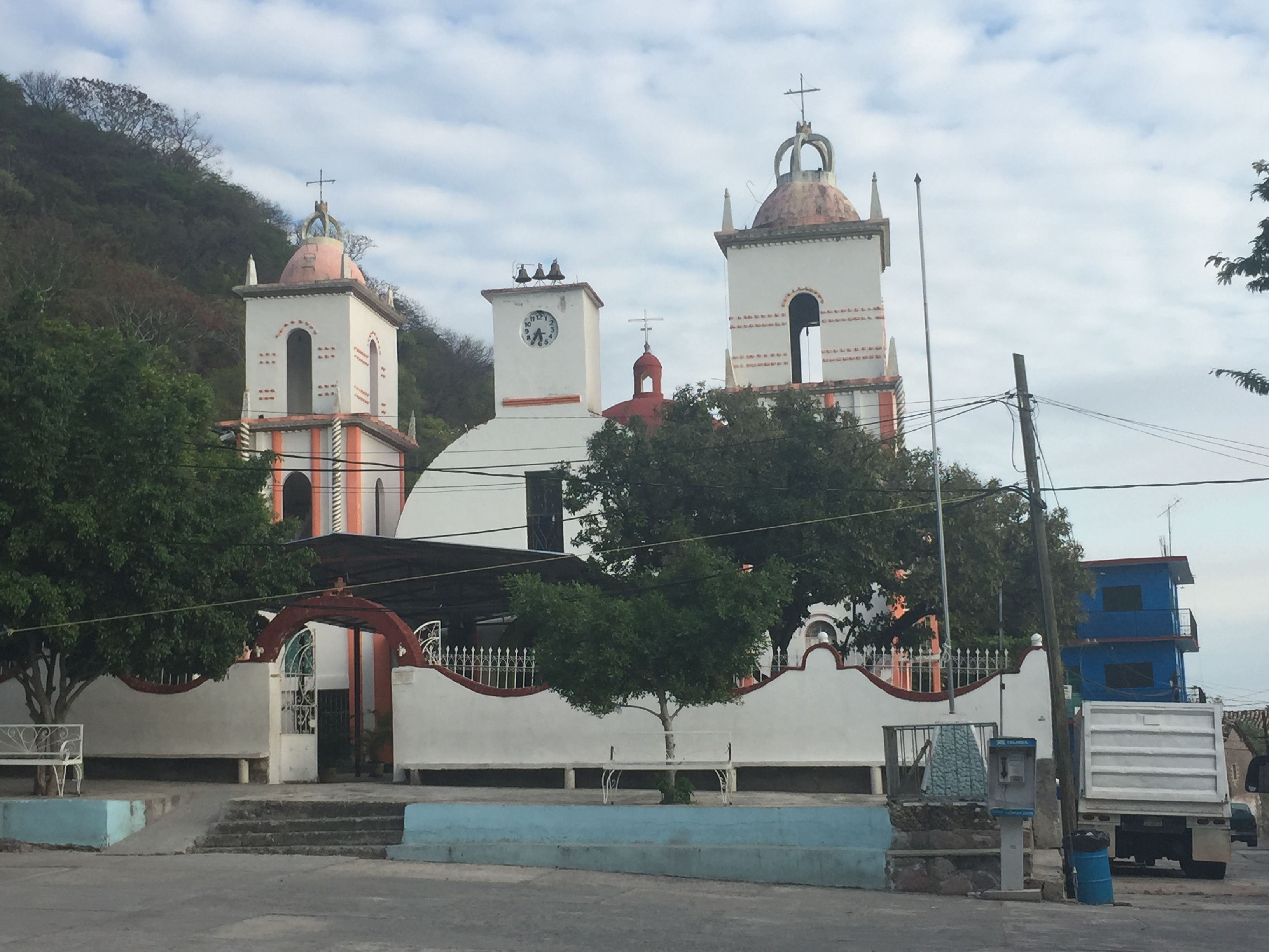 maxela